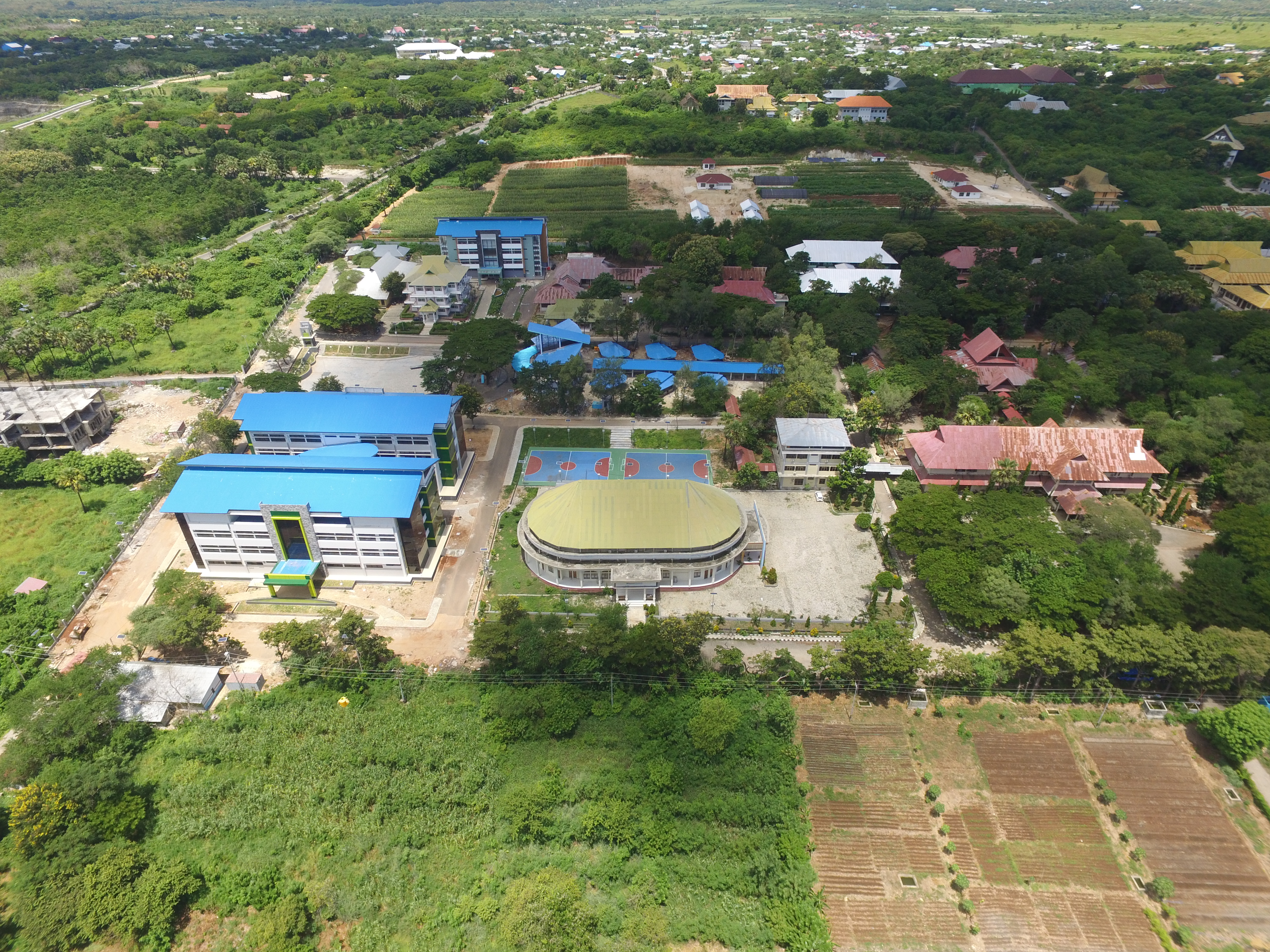 Kampus Politeknik Pertanian Negeri Kupang